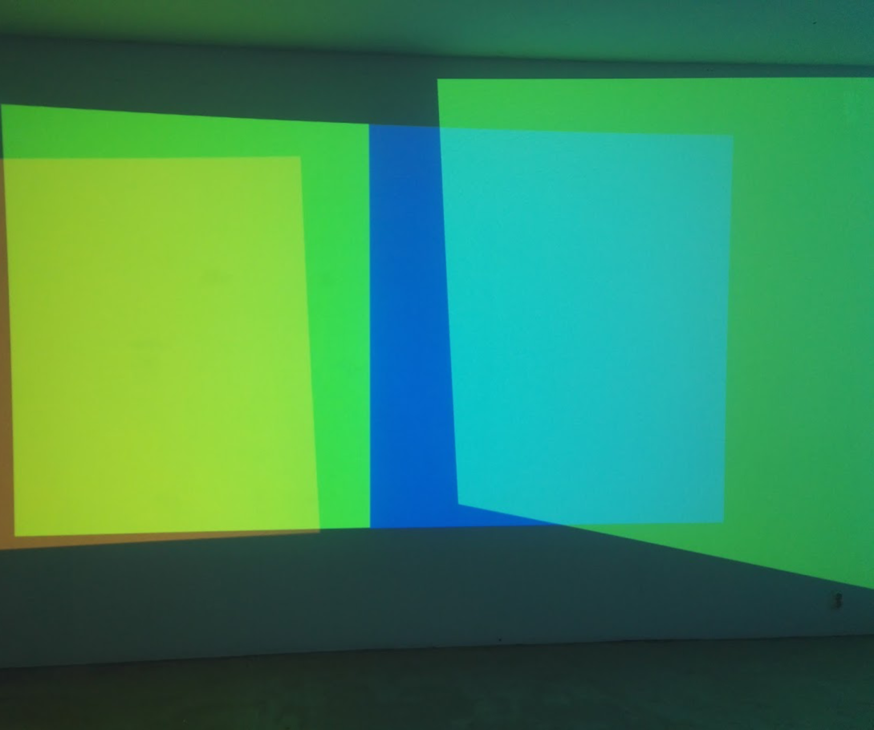 Juan Kasari Absence